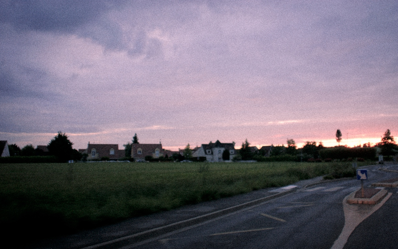 Straße in Quincy-sous-Sénart